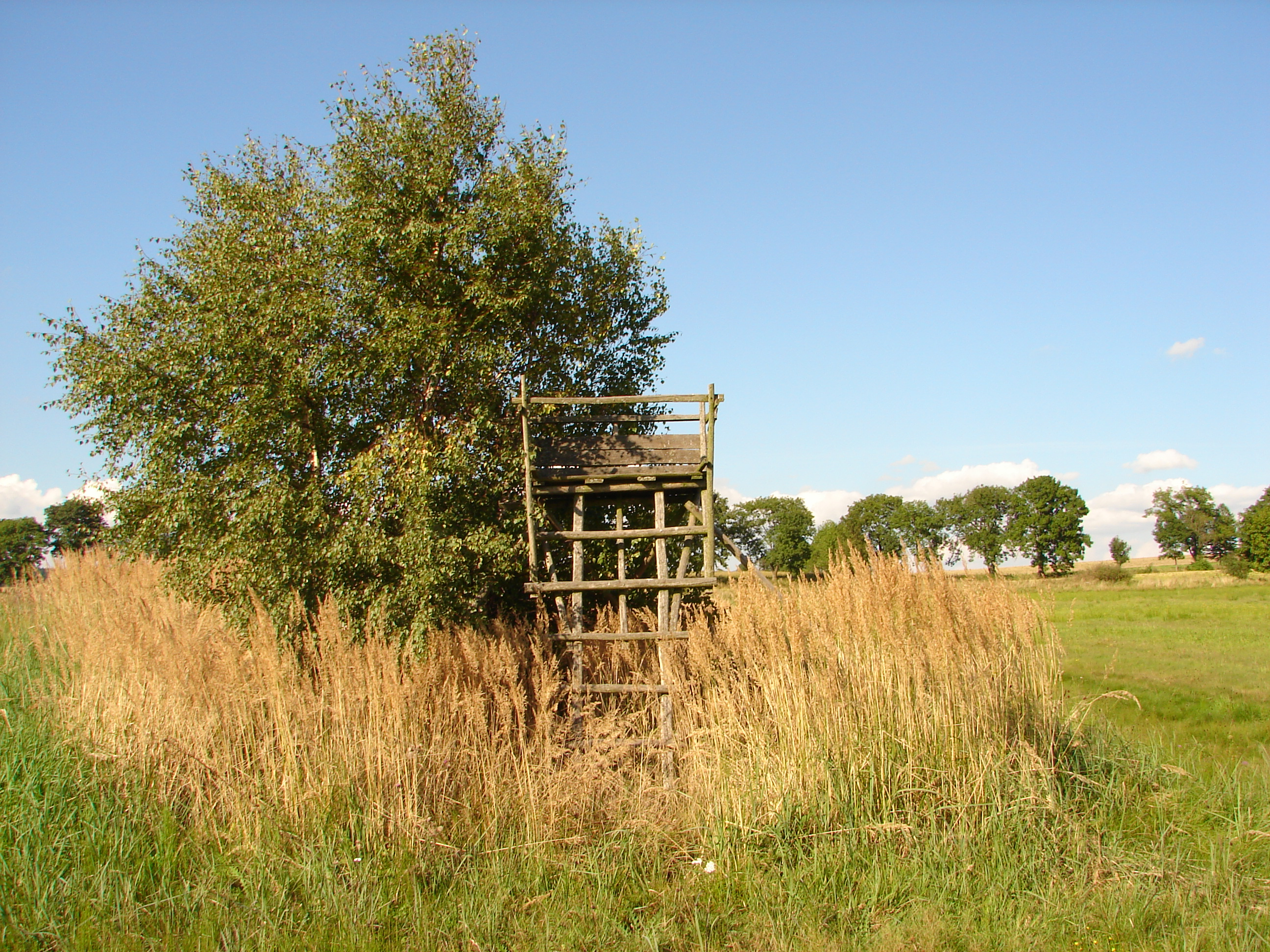 PR V Lisovech - posed, malá vodní plocha a třtina křovištní Calamagrostis epigejos